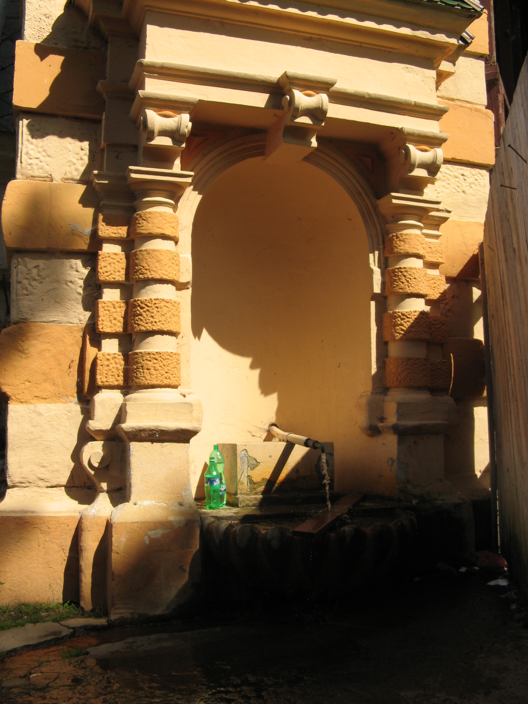 Pramen Mattoni v obci Kyselka v okrese Karlovy Vary